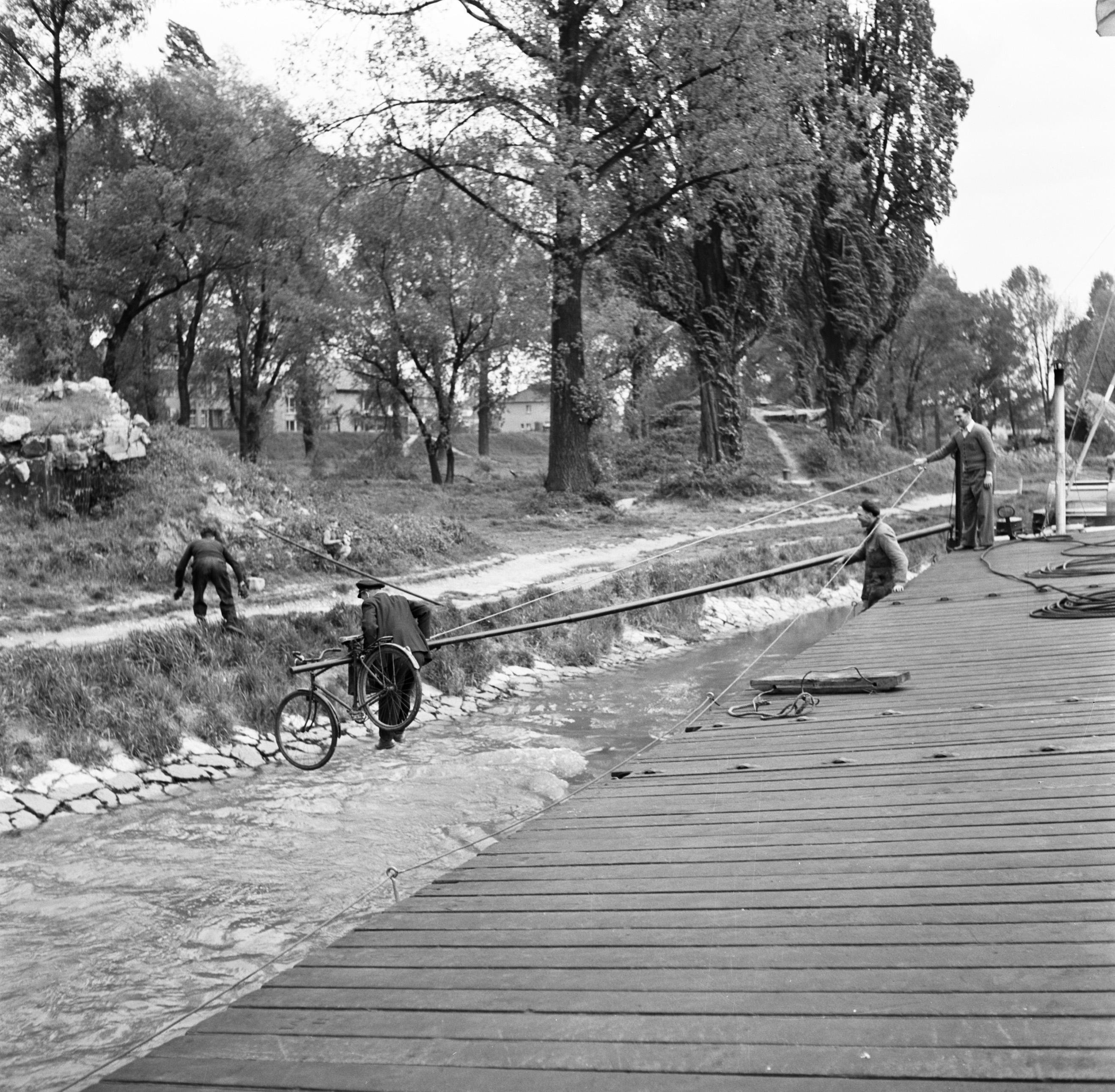 Collectie / Archief : Fotocollectie Van de Poll Reportage / Serie : Rijnvaart, reportage over het leven en werken aan boord van een Rijnschip Beschrijving : Loods hangt met zijn fiets boven de Rijn aan de zwaaiboom van de Damco 230 Datum : 1 april 1955 Locatie : Duitsland, Kehl, West-Duitsland Trefwoorden : binnenvaartschepen, fietsen, loodswezen, rivieren, schippers Fotograaf : Poll, Willem van de Auteursrechthebbende : Nationaal Archief Materiaalsoort : Negatief (6x6) Nummer archiefinventaris : bekijk toegang 2.24.14.02 Bestanddeelnummer : 254-1577